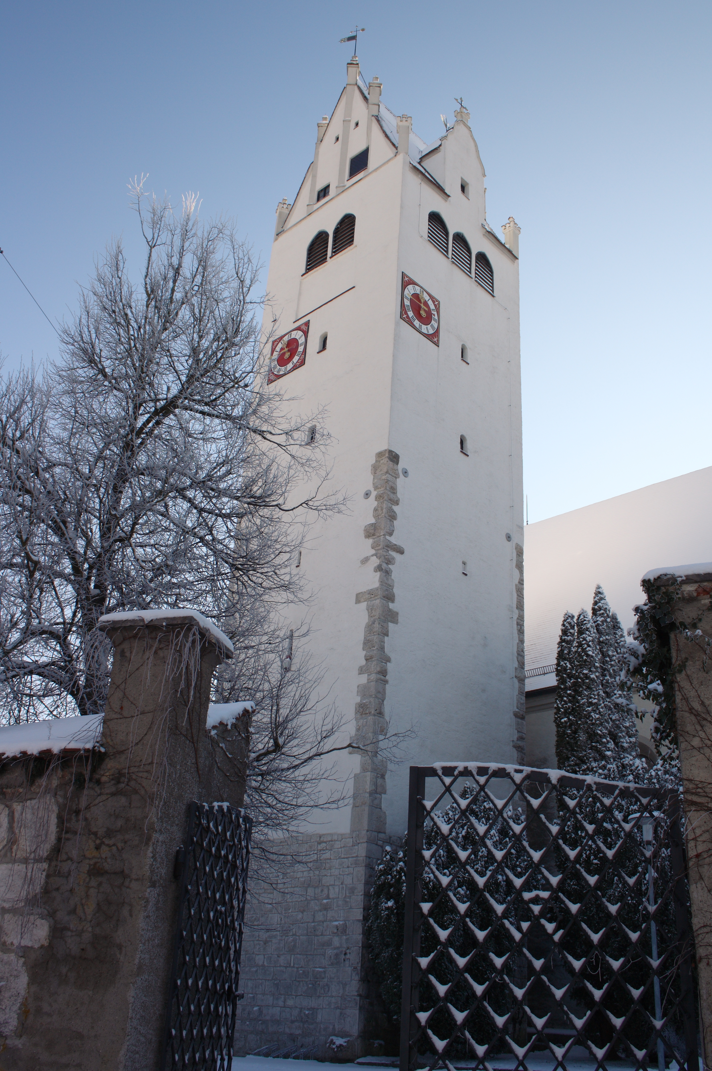 Katholische Pfarrkirche St. Ulrich und Martin in Wittislingen im Landkreis Dillingen an der Donau, Ansicht von Osten, freistehender, quadratischer Turm auf der Nordseite der Kirche, ehemals Bergfried einer Burg, vermutlich aus dem 13. Jahrhundert